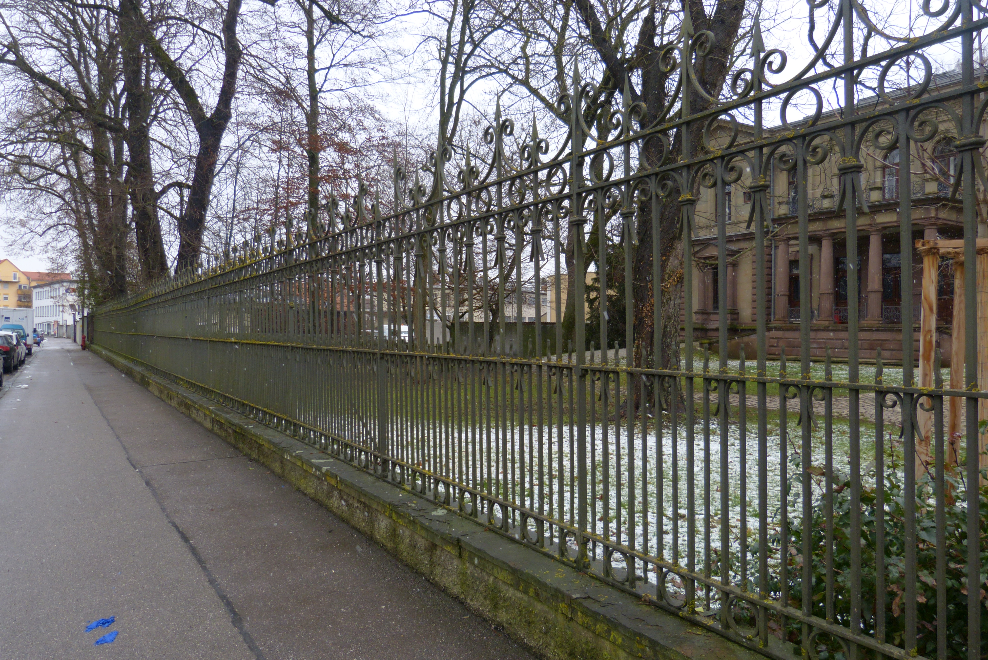 Gartenzaun der Villa Haag, unter Denkmalschutz stehend (D-7-61-000-499).